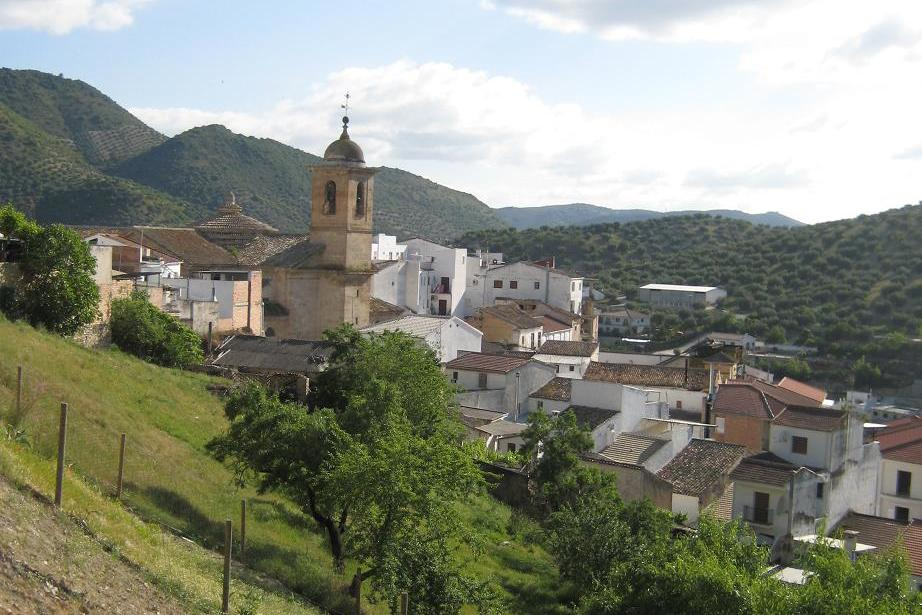 Vista de la localidad de Algarinejo, en la provincia de Granada (España)